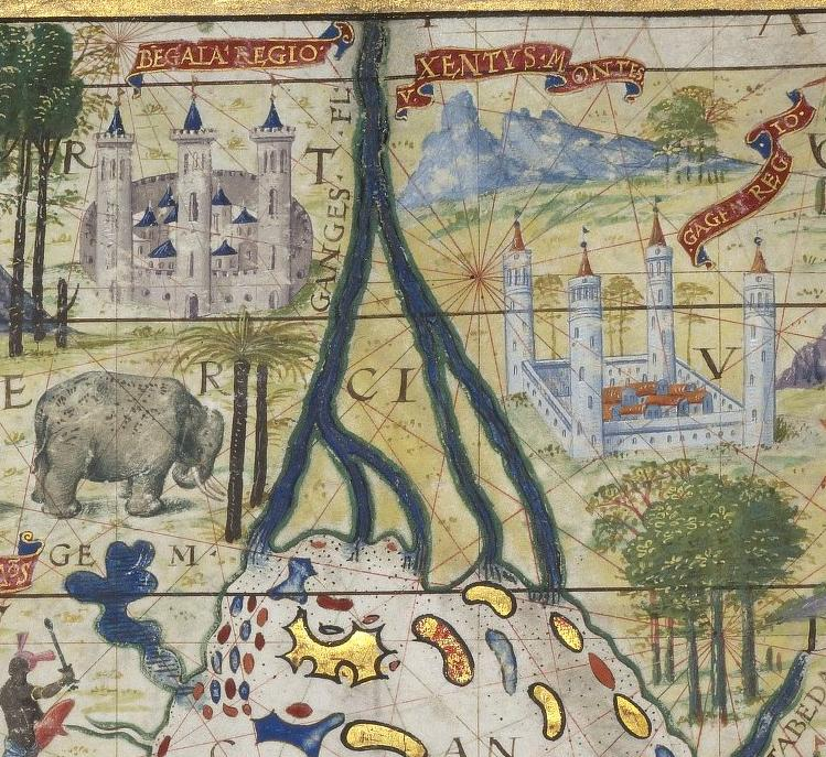 Delta del río Gangés en el mapa del océano Índico del Atlas Miller.